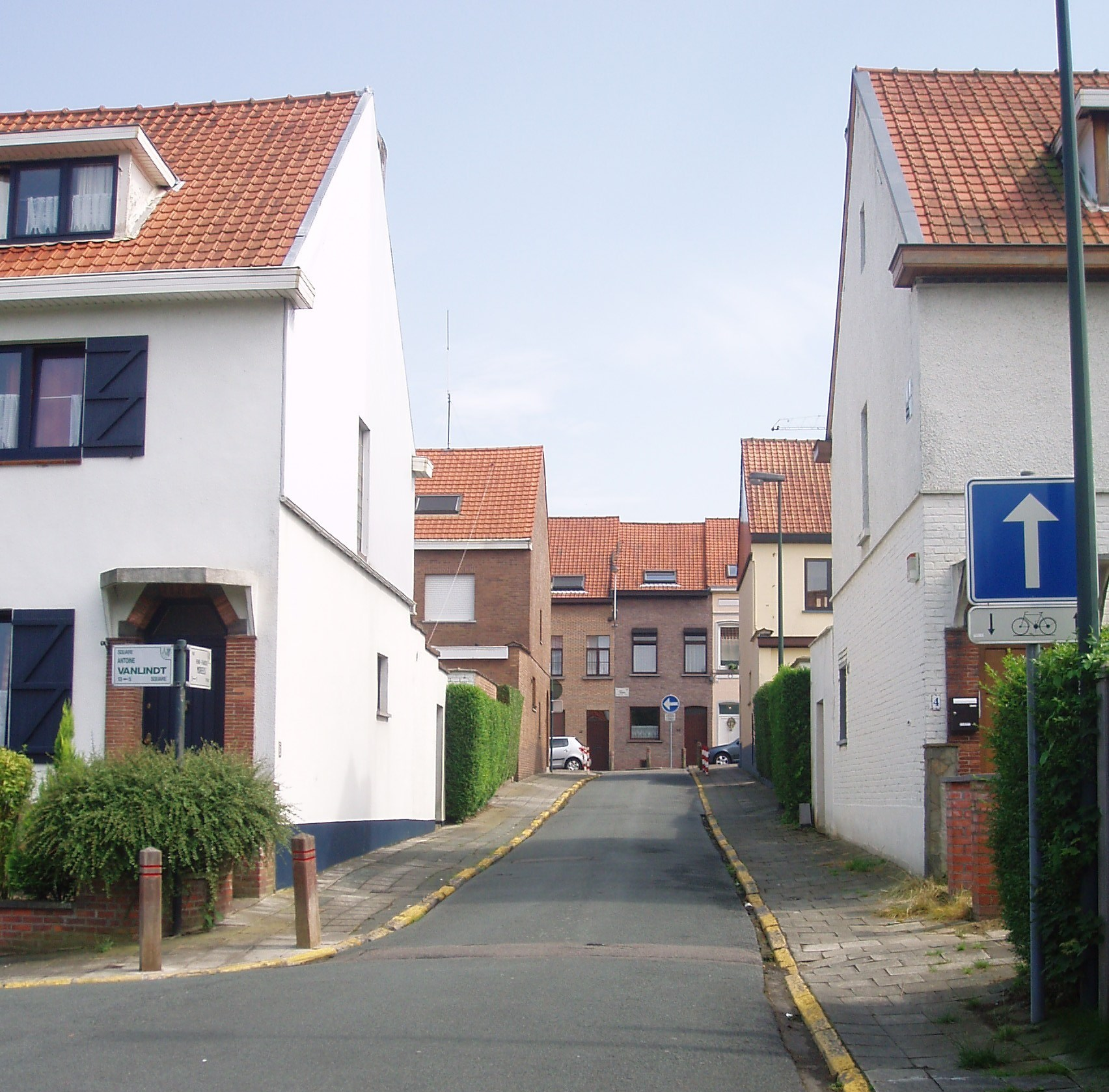 Rue Henri-François Moreels Auderghem, Belgique